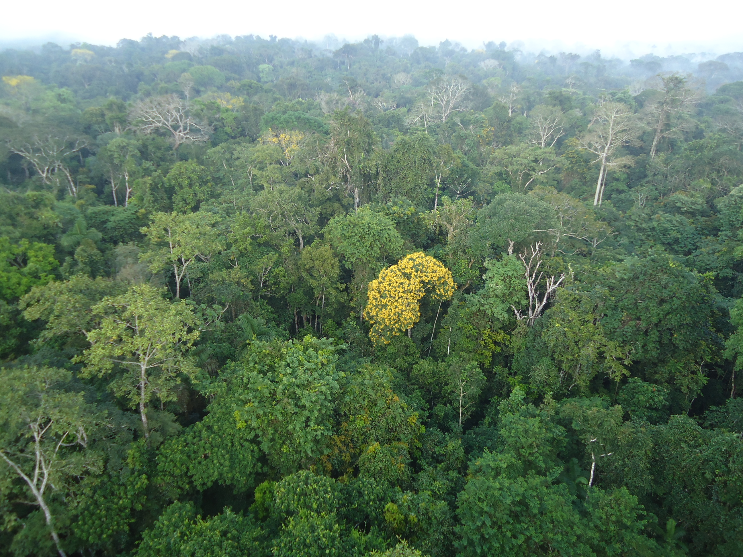 Floresta Amazônica vista da torre de observação na RPPN Cristalino - Alta Floresta / MT